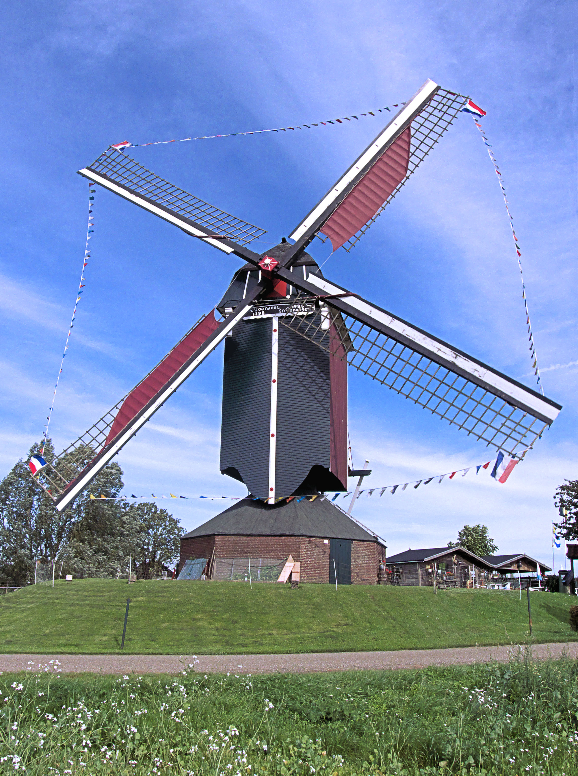 Standaadrmolen Tot Voordeel en Genoegen, Alphen